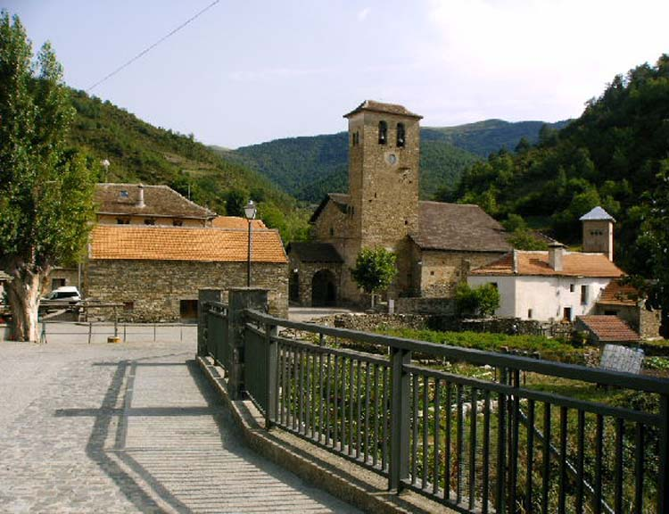 Urdués